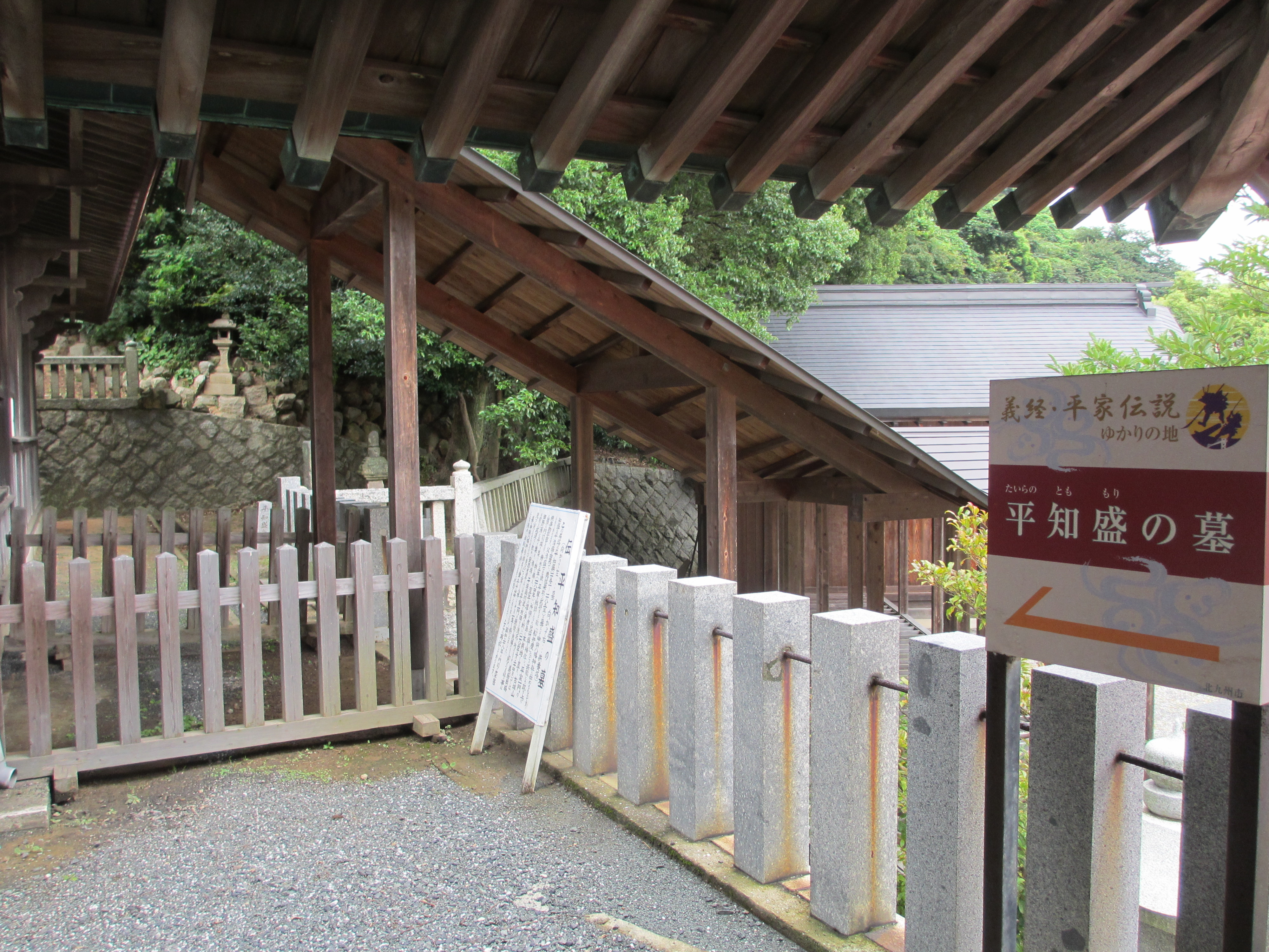 最寄JR門司港駅、甲宗八幡神社境内、右裏側侵入不可